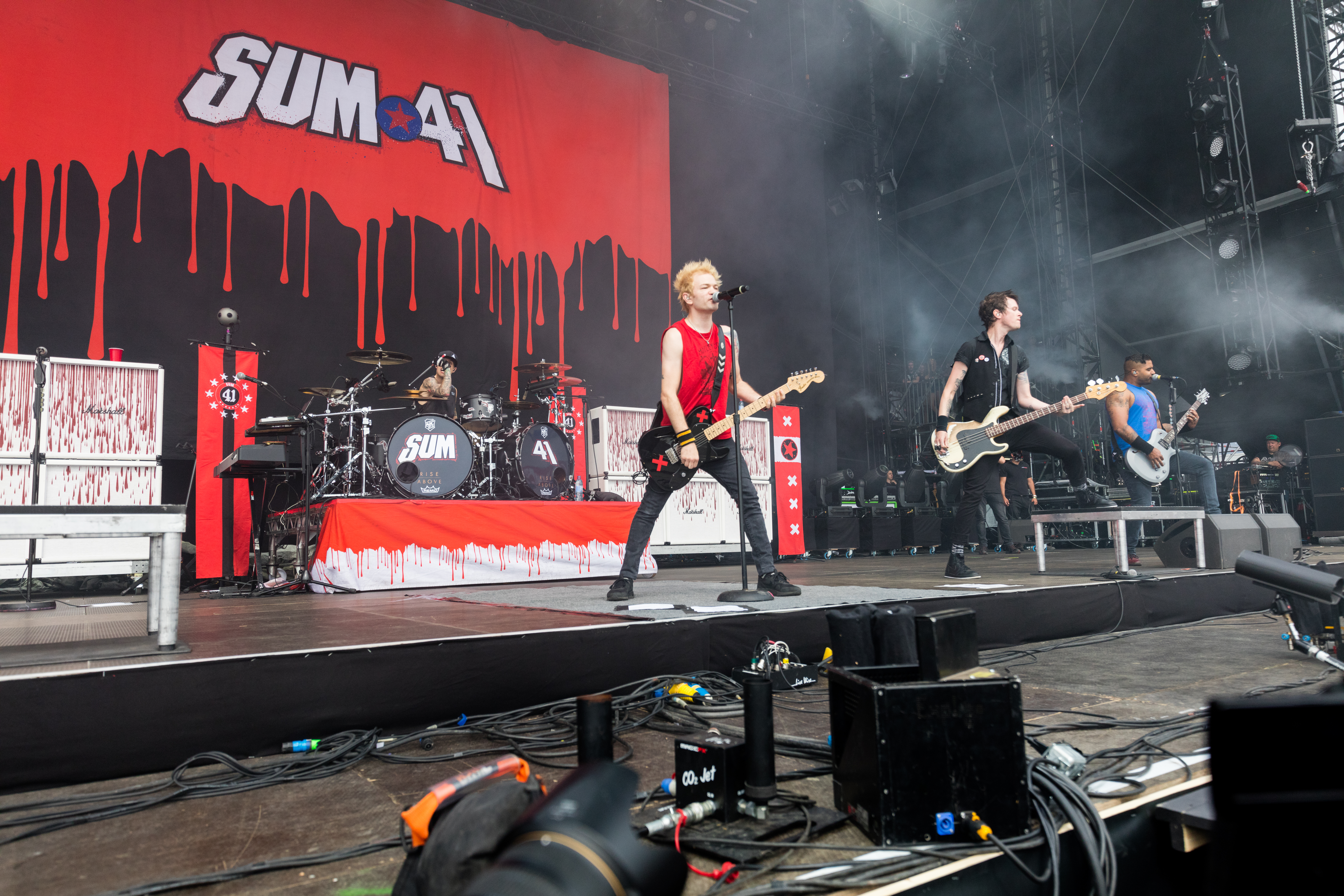 Sum 41 during Rock am Ring at Nürburgring, Nürburg, Rheinland Pfalz, Germany on 2017-06-03, Photo: Sven Mandel